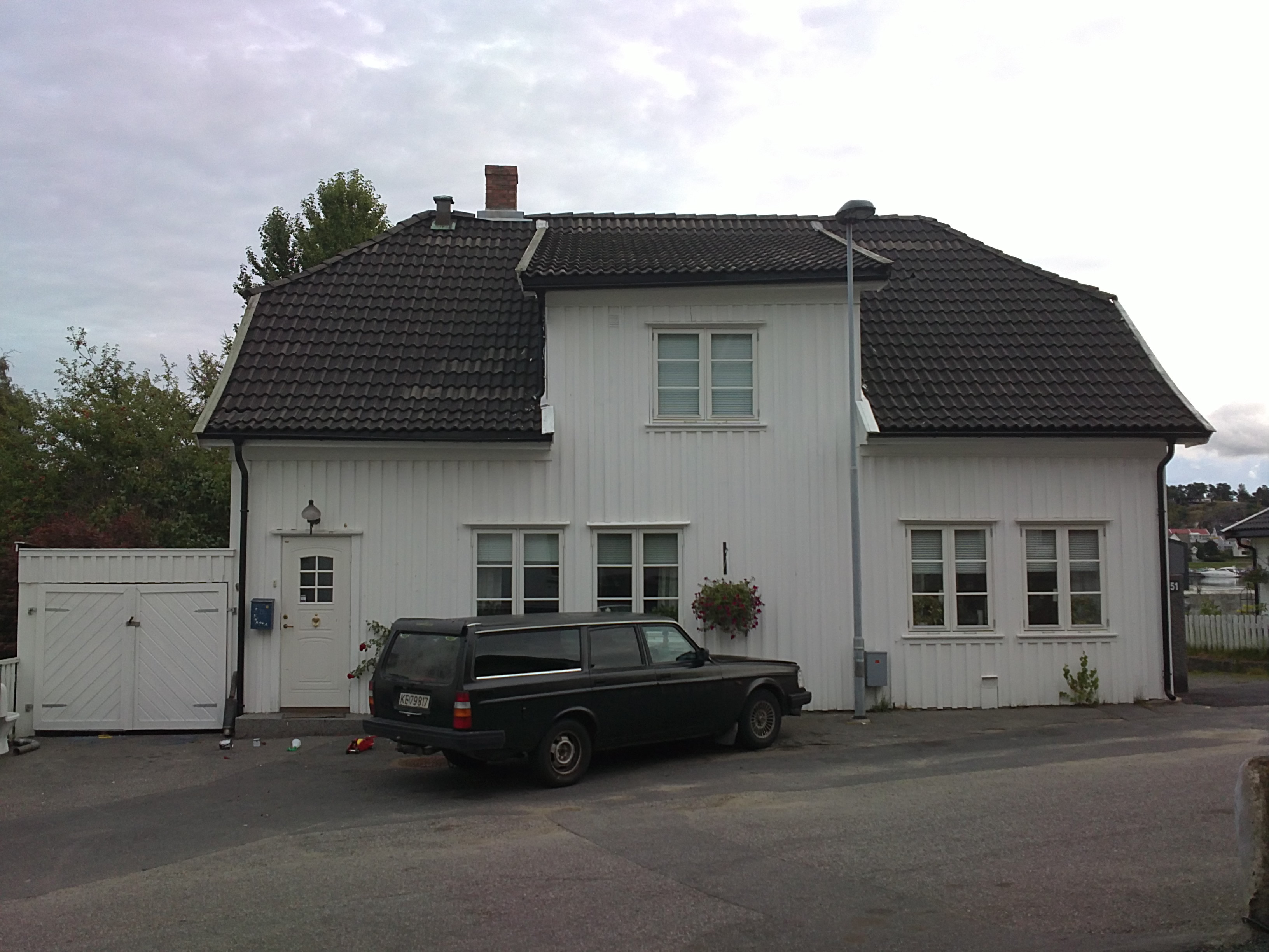 Bilde av Skiringsals gate 51, Larvik. I bakgården startet Ludvig Isachsen sin mangslungne virksomhet i 1916.